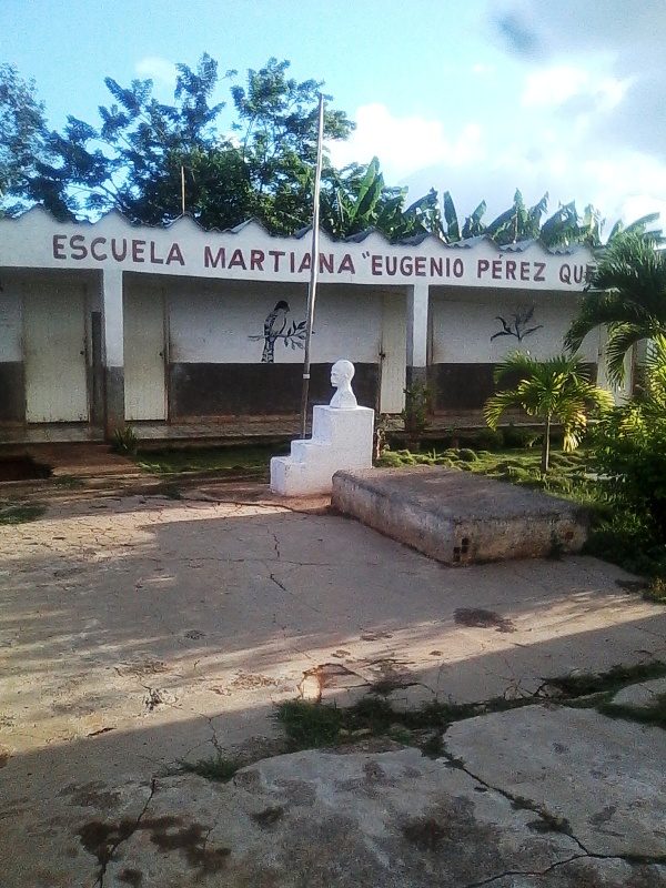 Escuela de Alegría de Pío